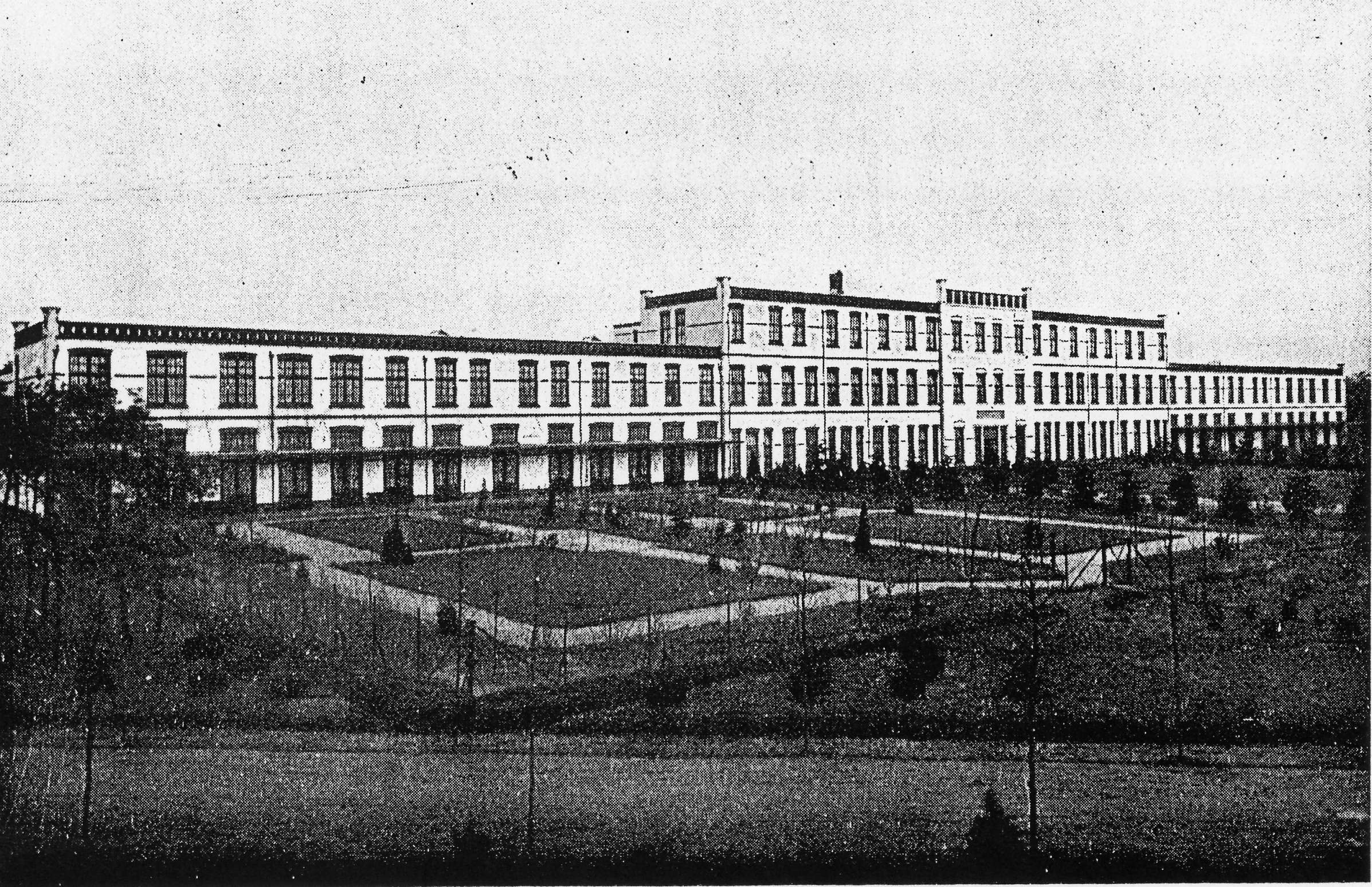 Hoofdgebouw Apeldoornsche Bosch